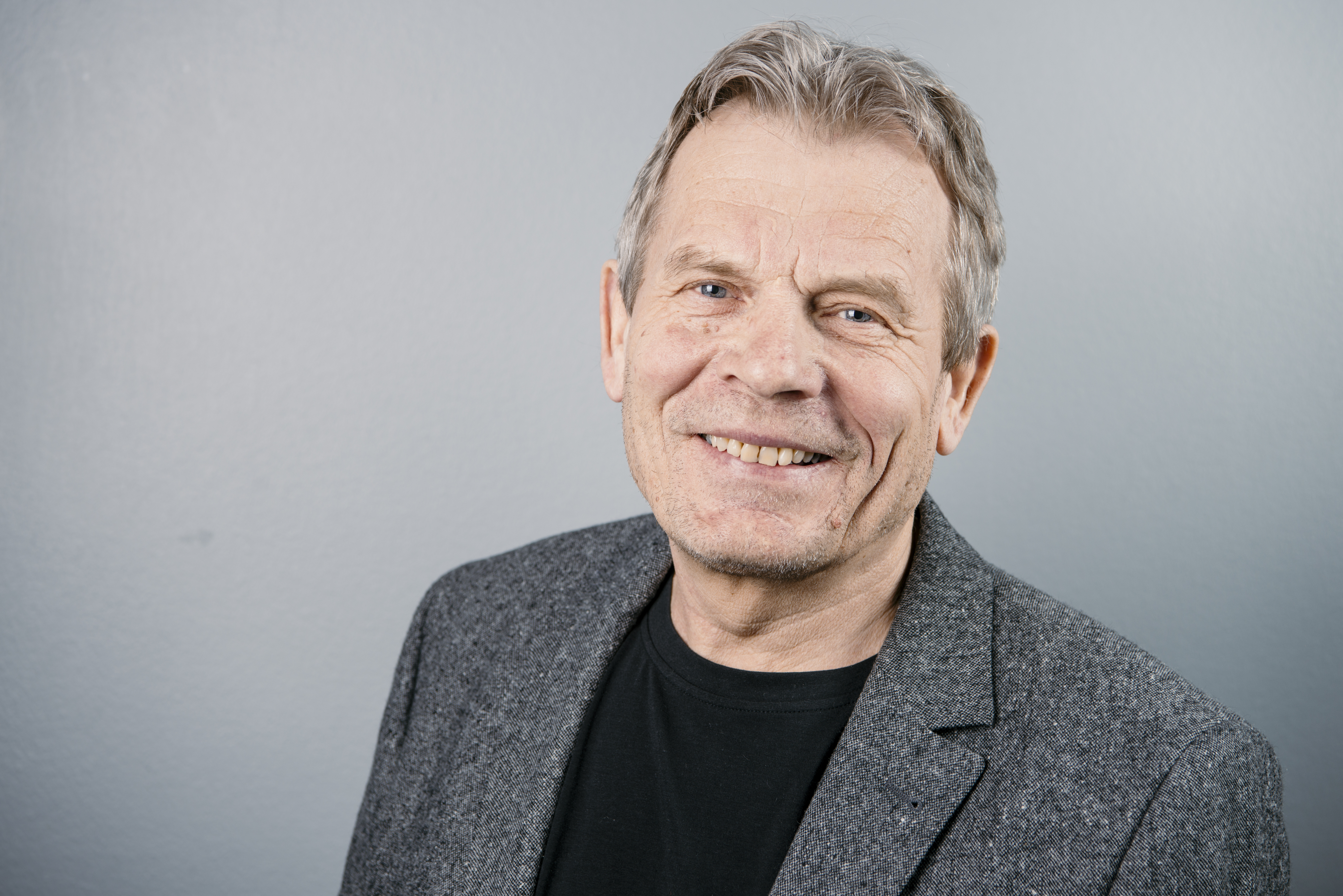 Arne Nævra